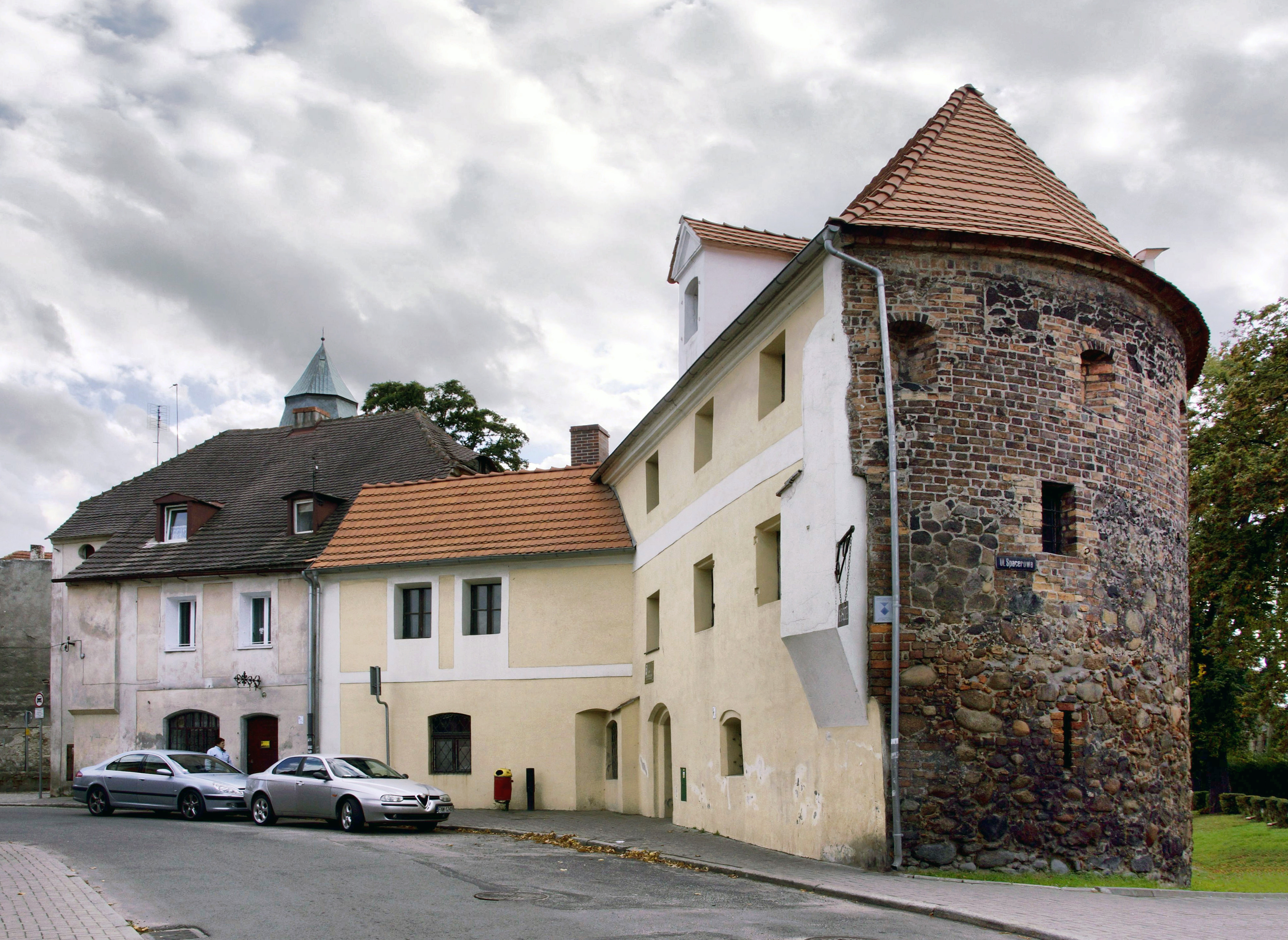 Mury obronne z basztami, mur., XIII, XV. Baszta Krośnieńska Kożuchów 04.1958.